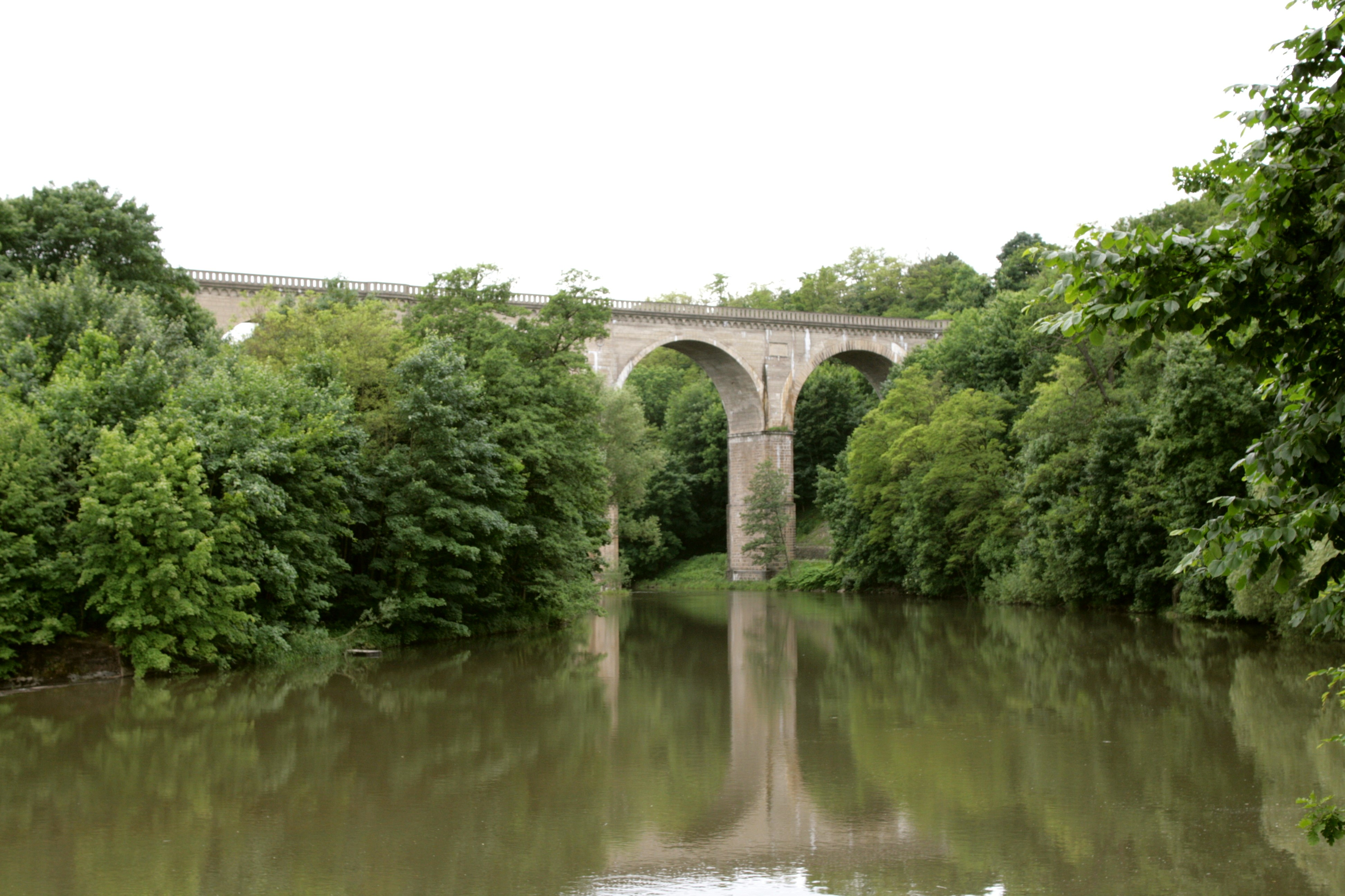 Neißeviadukt, An der Obermühle/Inselweg in Görlitz